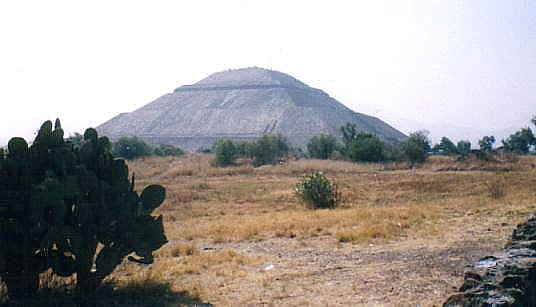 Vista de la Pirámide del Sol en Teotihuacán, México.